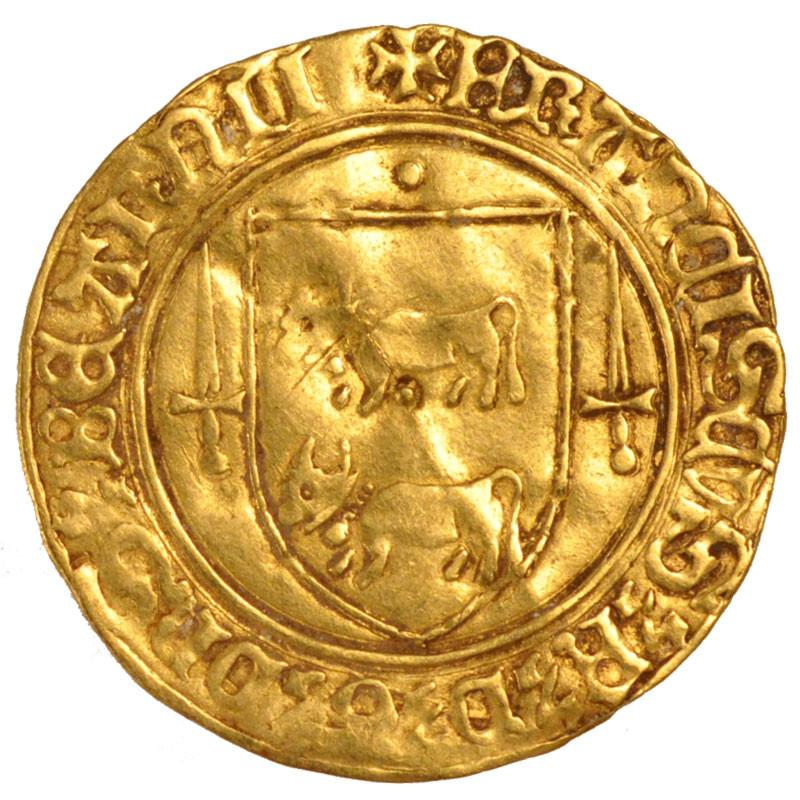 Écu d'or de François Fébus (XVe s.), atelier monétaire de Morlaàs.